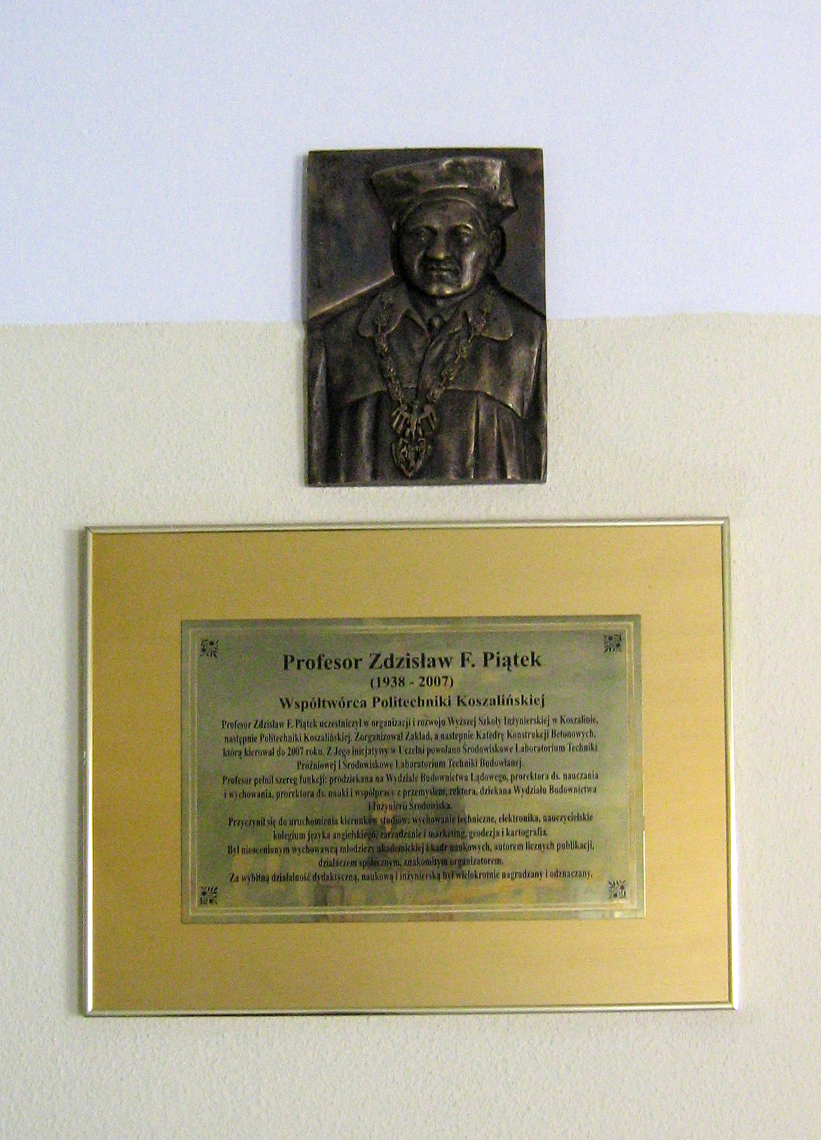 Politechnika Koszalińska